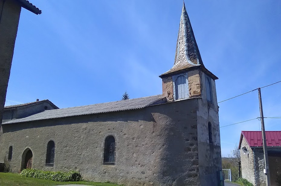 Église Notre-Dame-de-la-Nativité de Chazelles (Cantal). Nef et clocher.